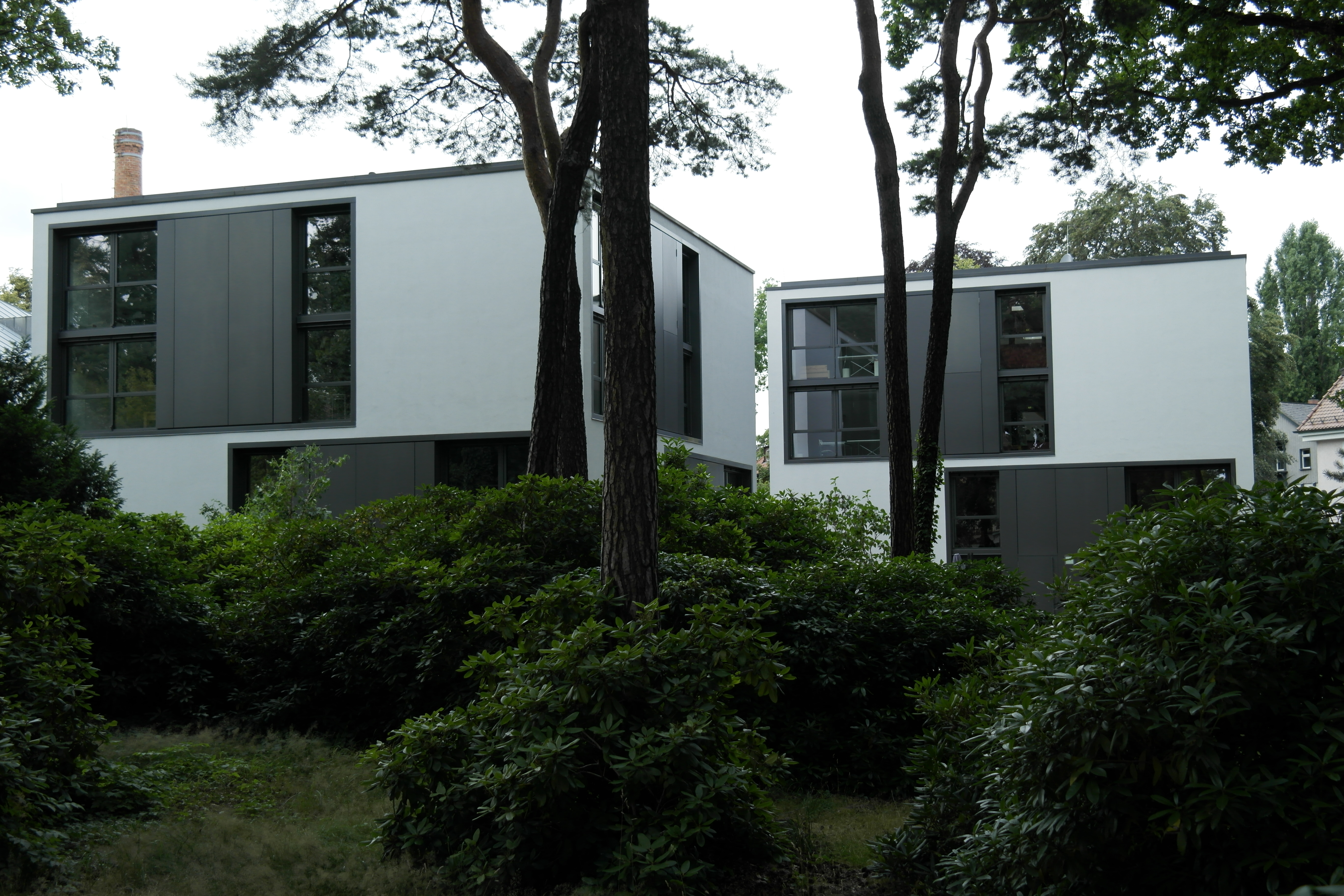 Internatsgebäude des Sächsischen Landesgymnasiums für Musik an der Villa Rothermundt